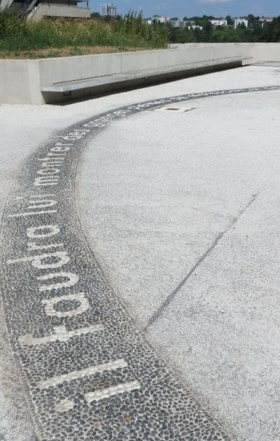 Zentrum für Molekularbiologie der Pflanzen in Tübingen mit einem Mosaikspruchband des Gedichtes "La rançon" Charles Baudelaire gestaltet von Ilona Lenk (* 1964 in Stuttgart)